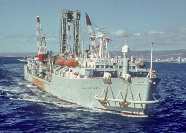 R/V Sedco 445 utilisé par OMI pour tester le ramassage des nodules polymétallique